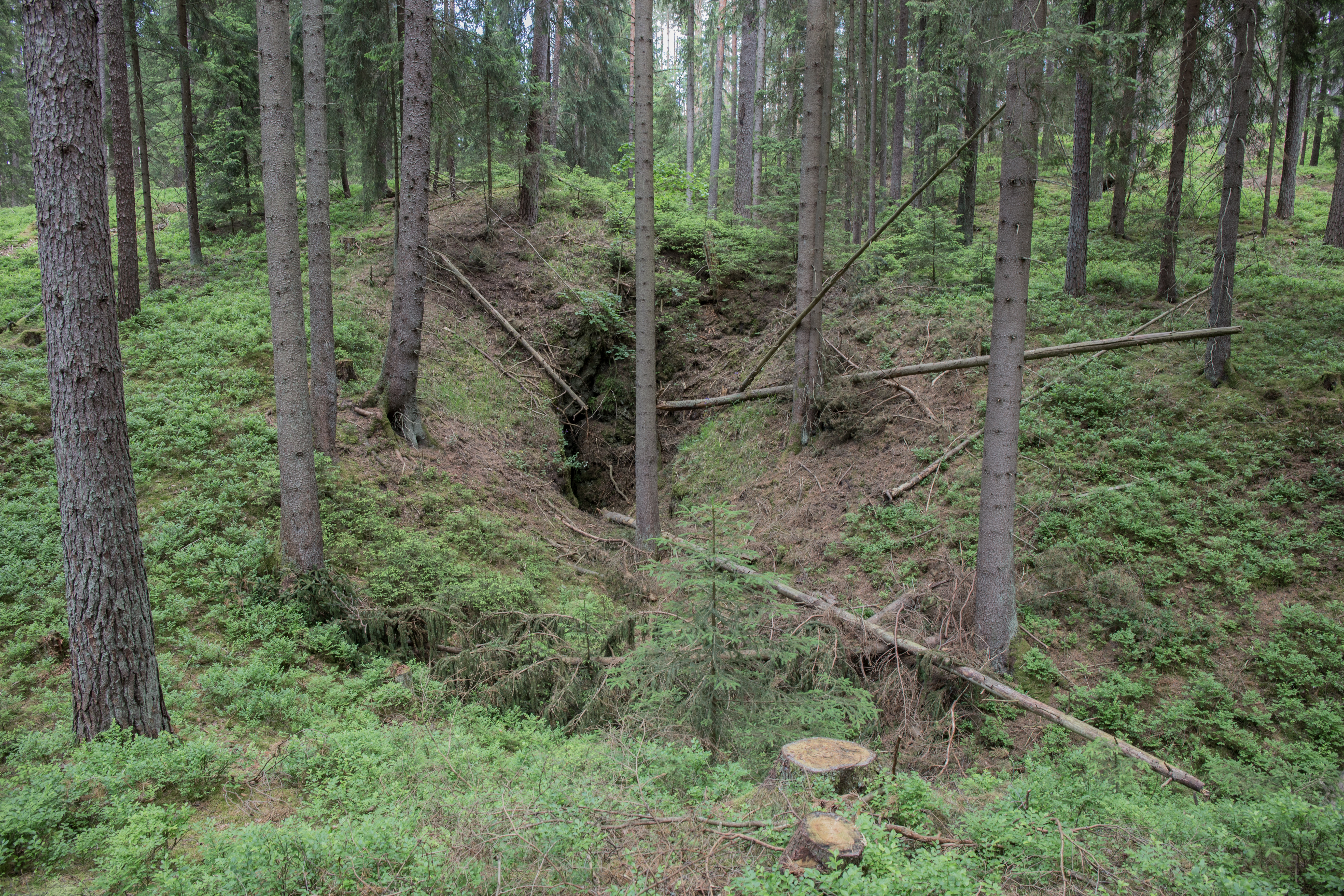 Doline mit dem Diebskeller als Wasser-Schluckloch. Im Hintergrund zwei weitere Dolinen